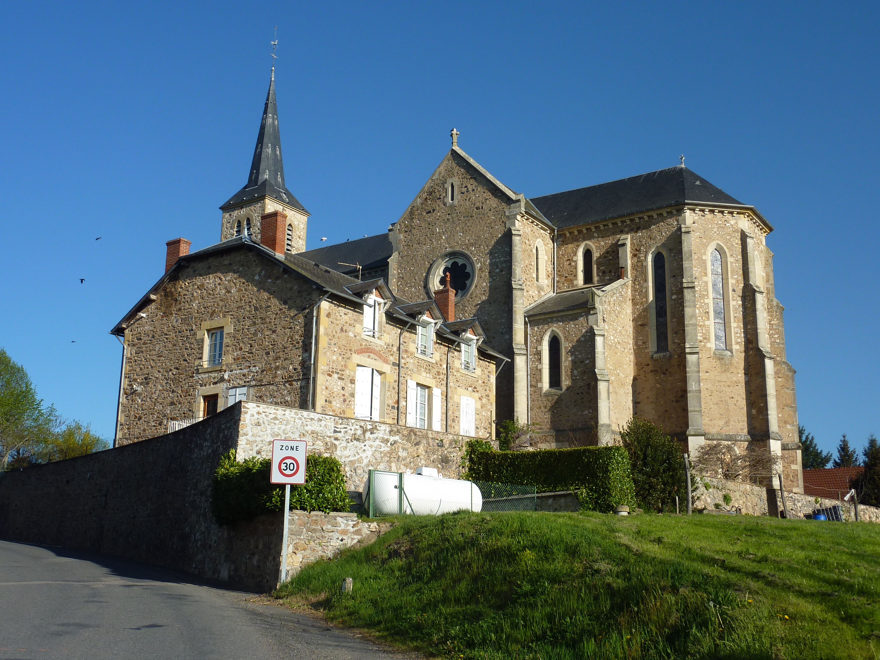 Chiddes (Nièvre) : L'église paroissiale